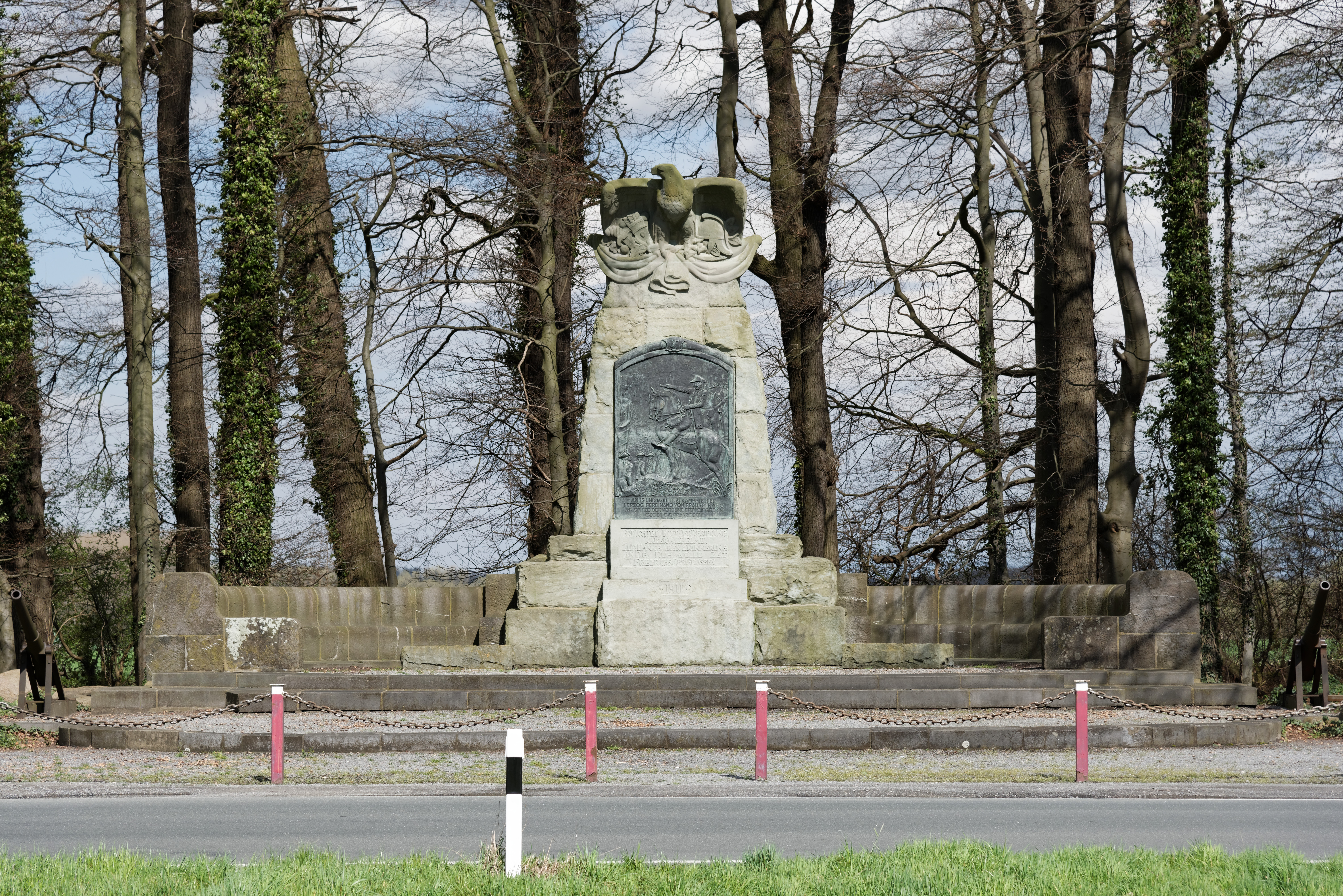 Denkmal zur Erinnerung an die Schlacht bei Vellinghausen This is a photograph of an architectural monument.